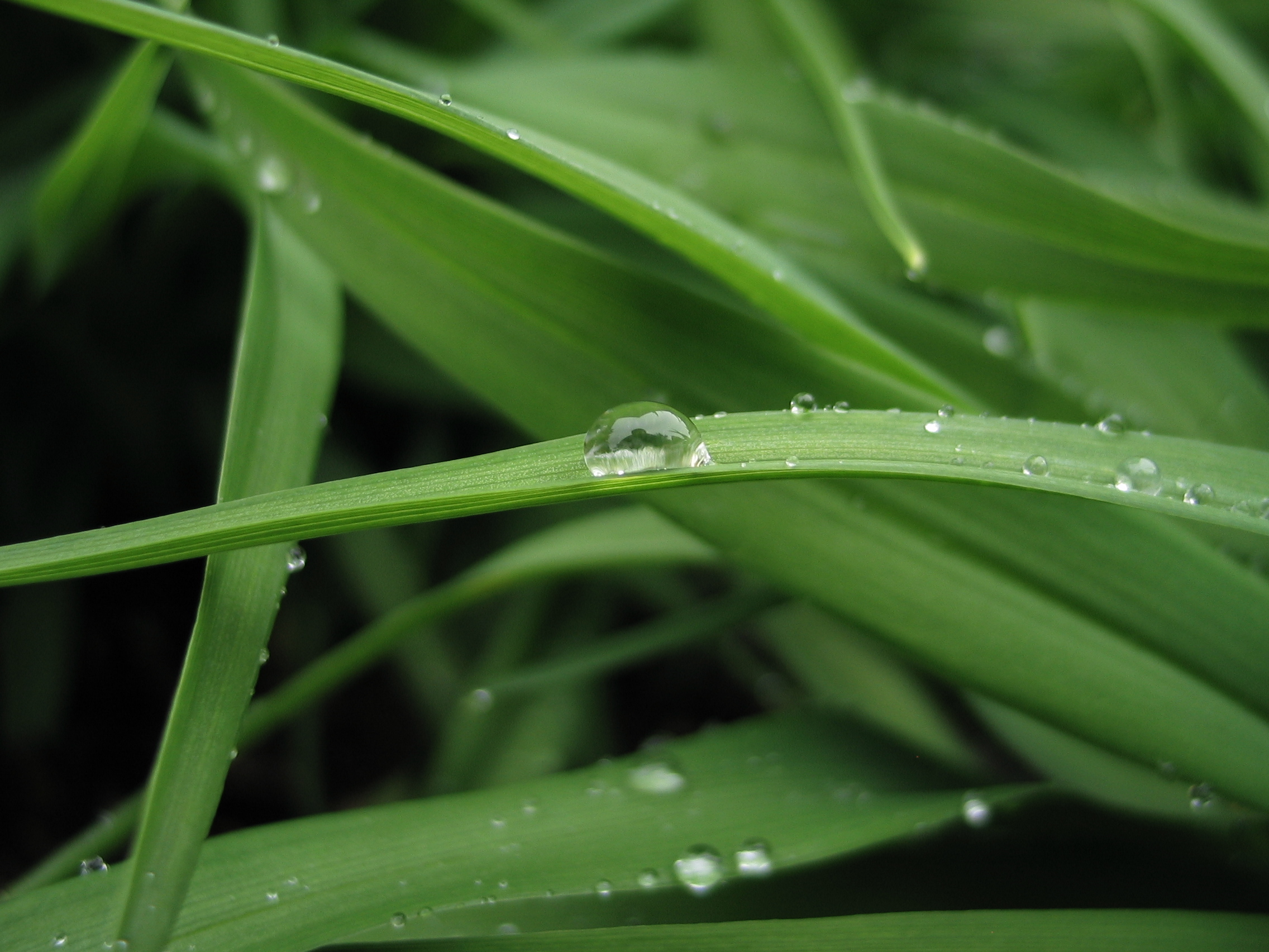 Dew on a green plant